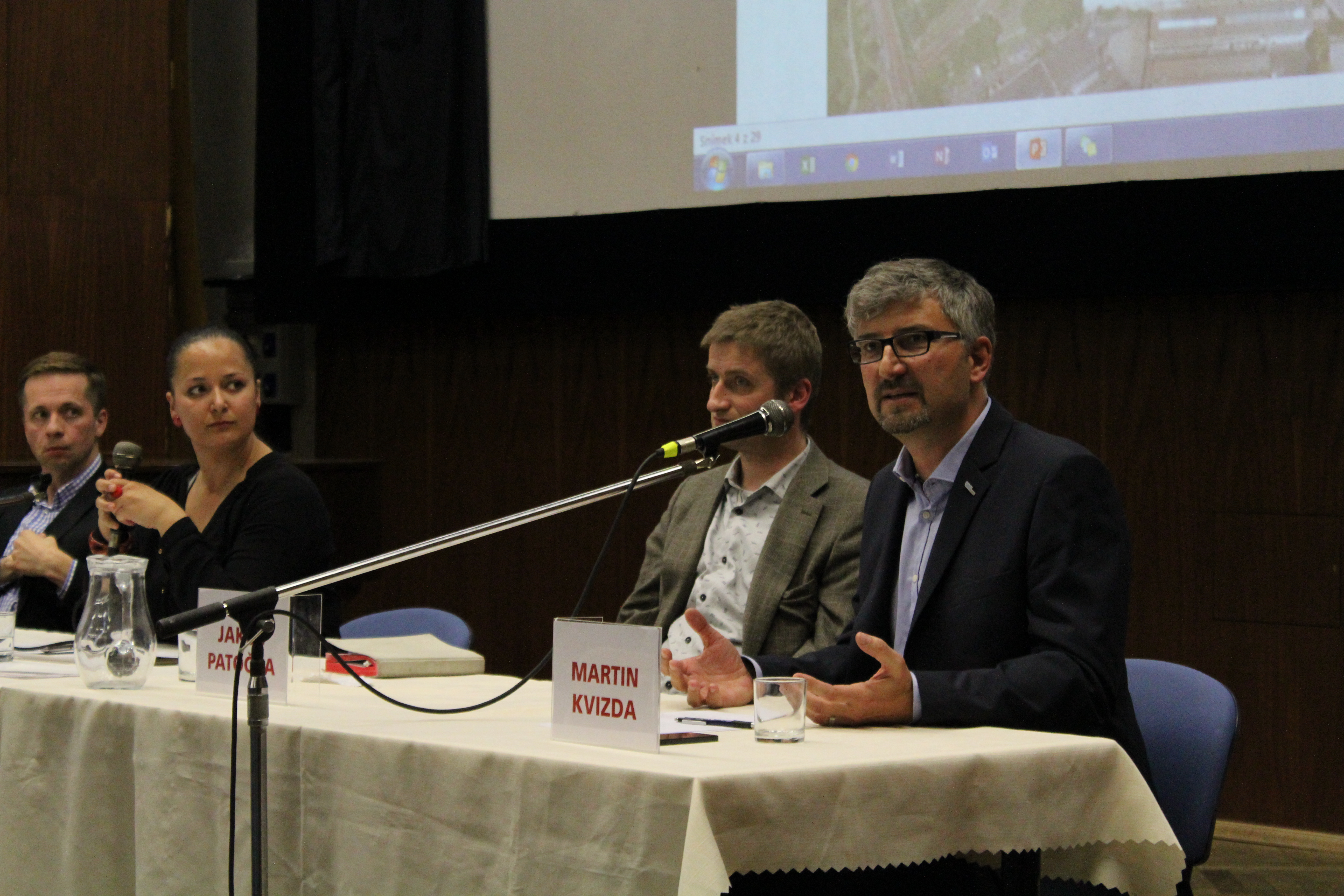 Martin Kvizda, výklad ekonomie nádraží 16. 5. 2016